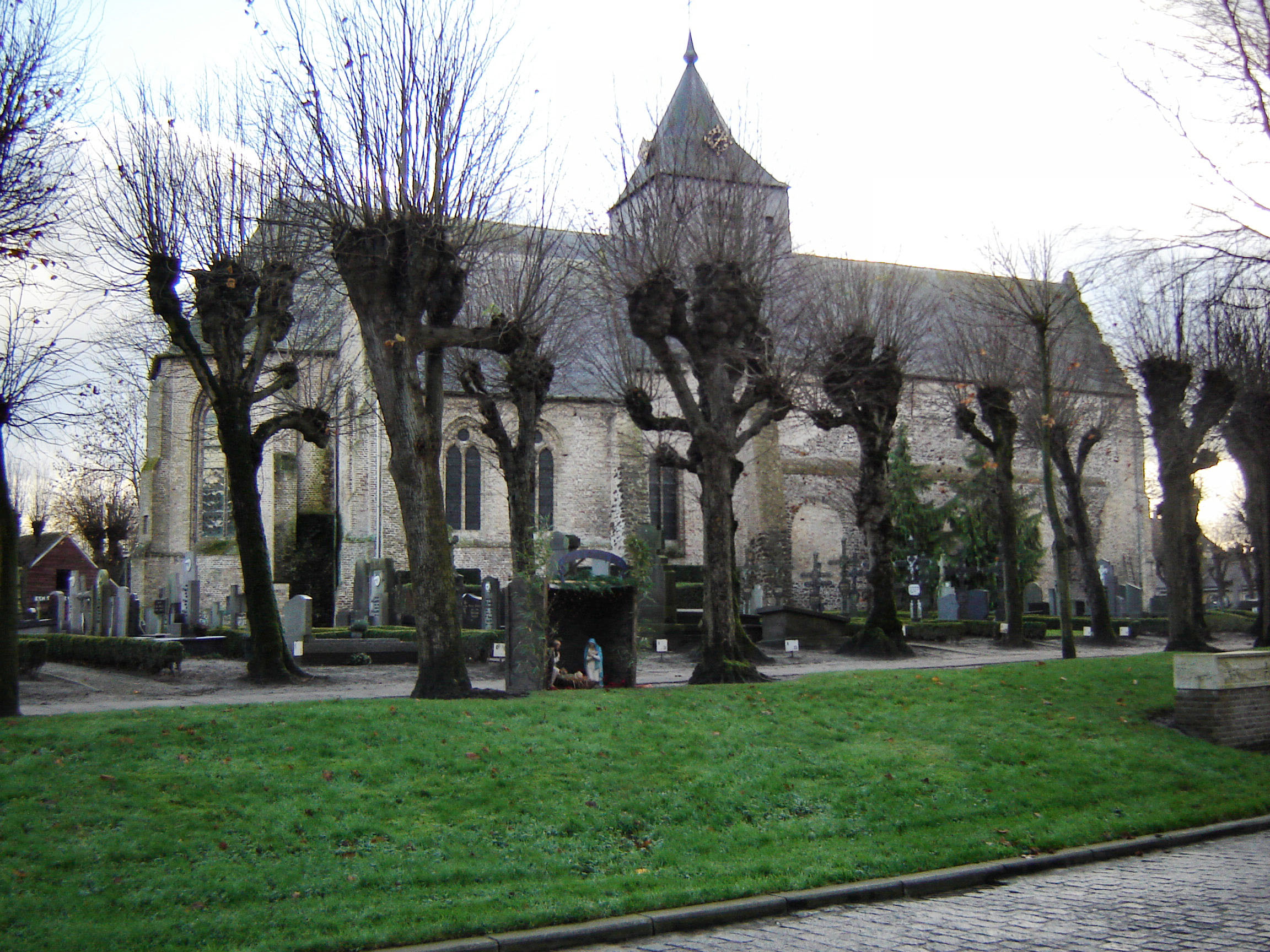 Onze-Lieve-Vrouwekerk in Wulveringem (Beauvoorde), Veurne.